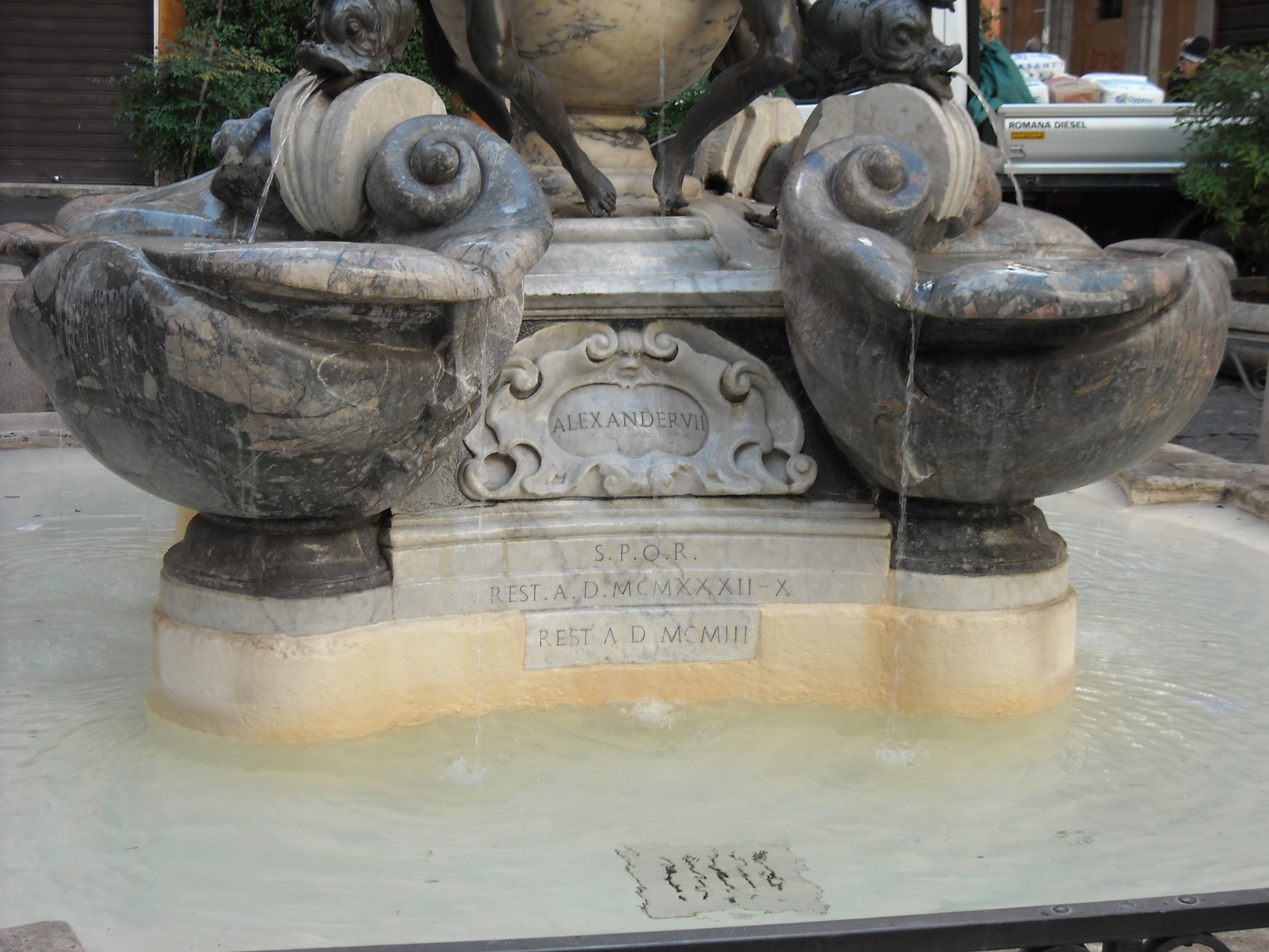 La fontana delle Tartarughe in piazza Mattei - particolare delle conchiglie, di uno dei quattro cartigli e dell'iscrizione dei restauri